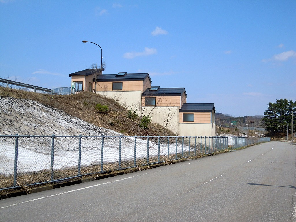 山形自動車道に設置されている庄内あさひバスストップ（上り線側）の外観